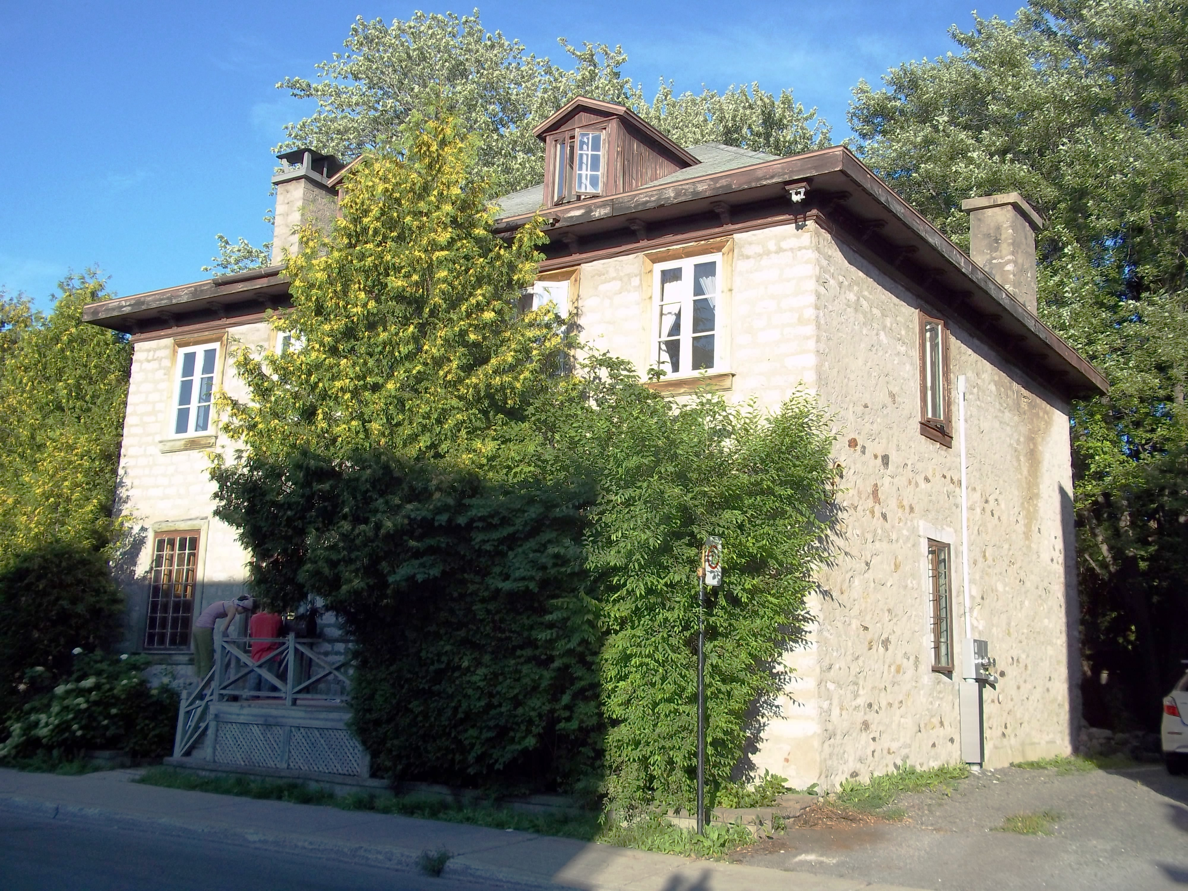 Maison Pascal-Persillier dit Lachapelle, 2084, boulevard Gouin Est, Montréal (info)